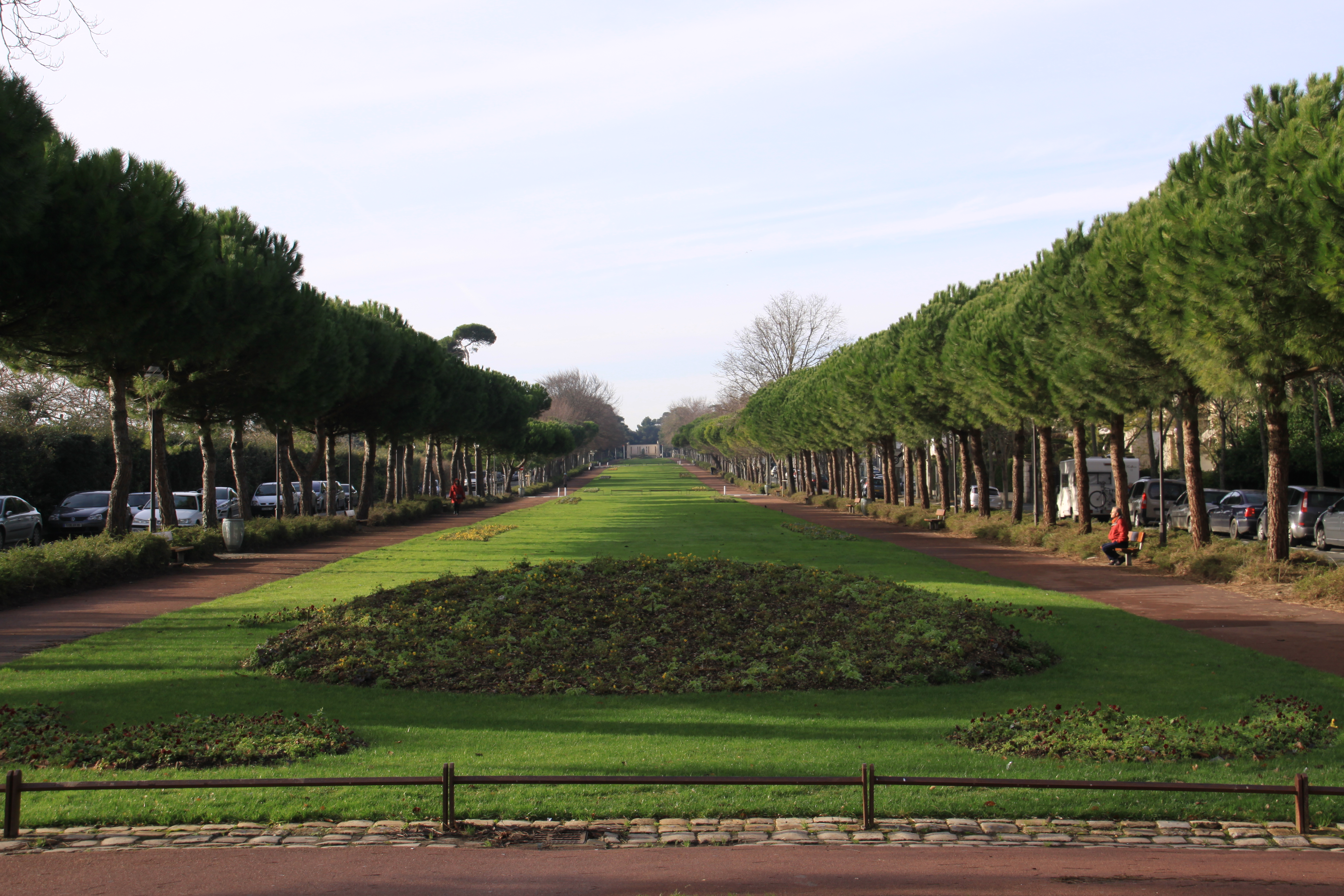 Les Allées du Mail (ou le Mail) sont le nom d'une promenade publique située en bordure de la mer et près de la plage de la Concurrence à La Rochelle. Le Mail mesure environ sept cent cinquante mètres de long. La Rochelle, Charente Maritime, France.